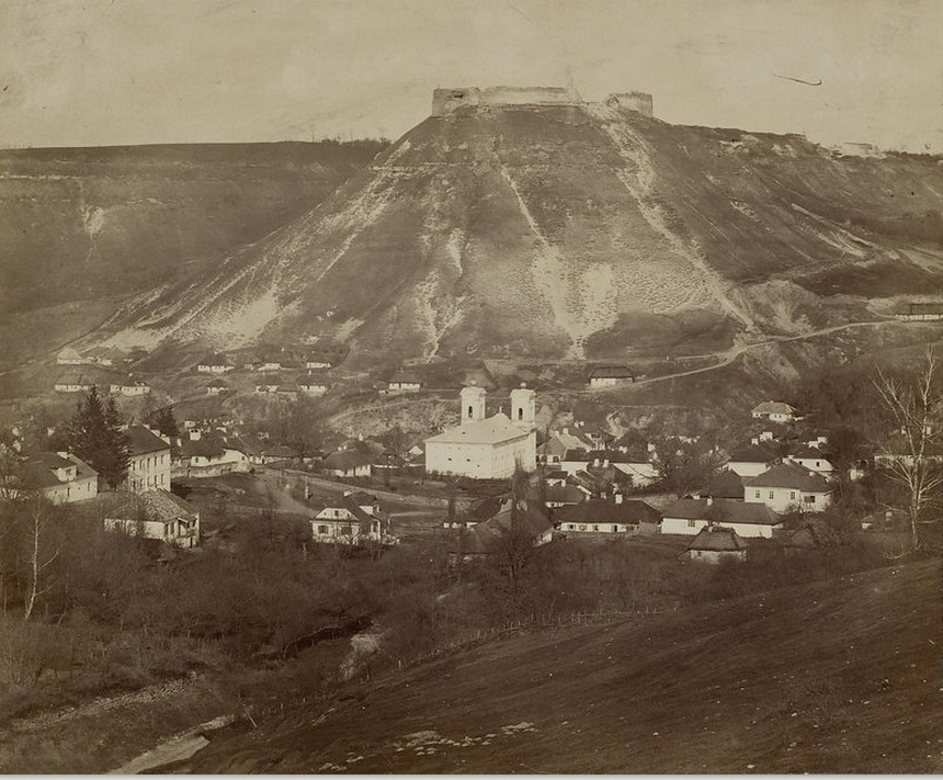 Руїни Кременецького замку на горі Бона, 2 половина 19 століття